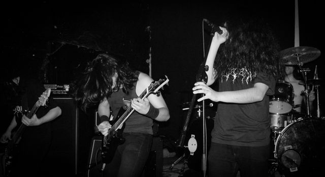 Fliegend en el Doom Death and Darkness Festival, 27 de noviembre, 2010